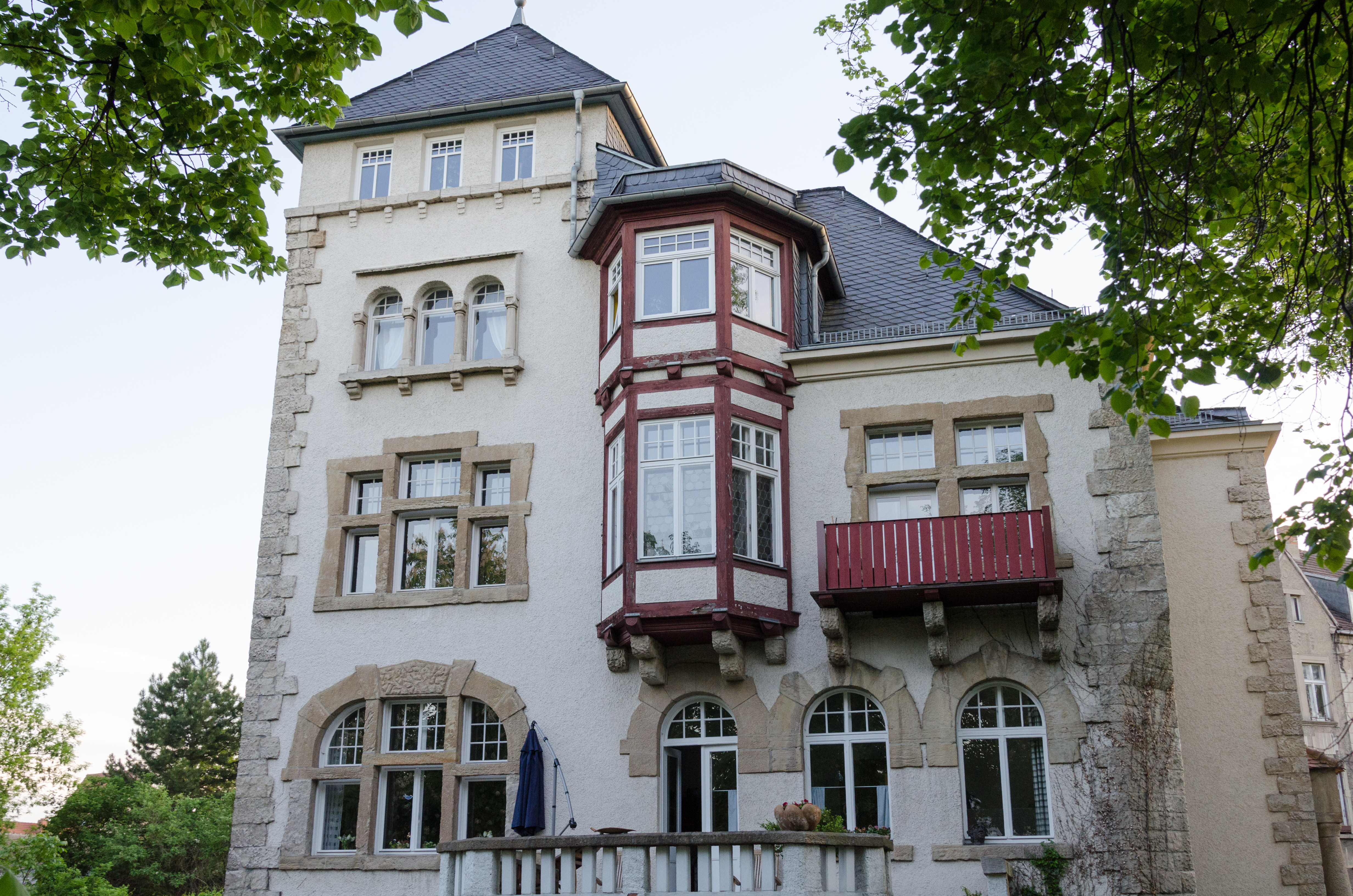 Naumburg, Marienmauer 19